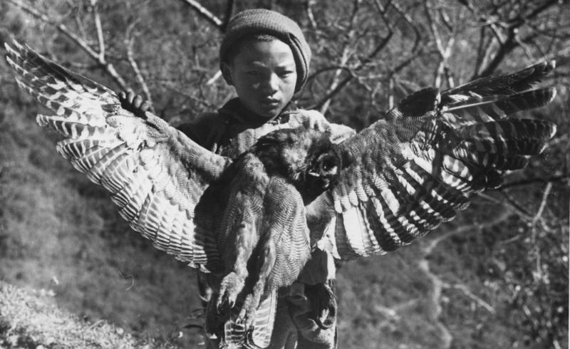 Gangtok, Großeule